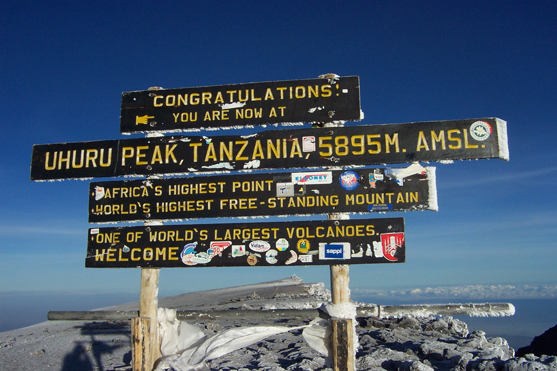 Sign at Uhuru Peak, Mt Kilimanjaro, Tanzania, Africa